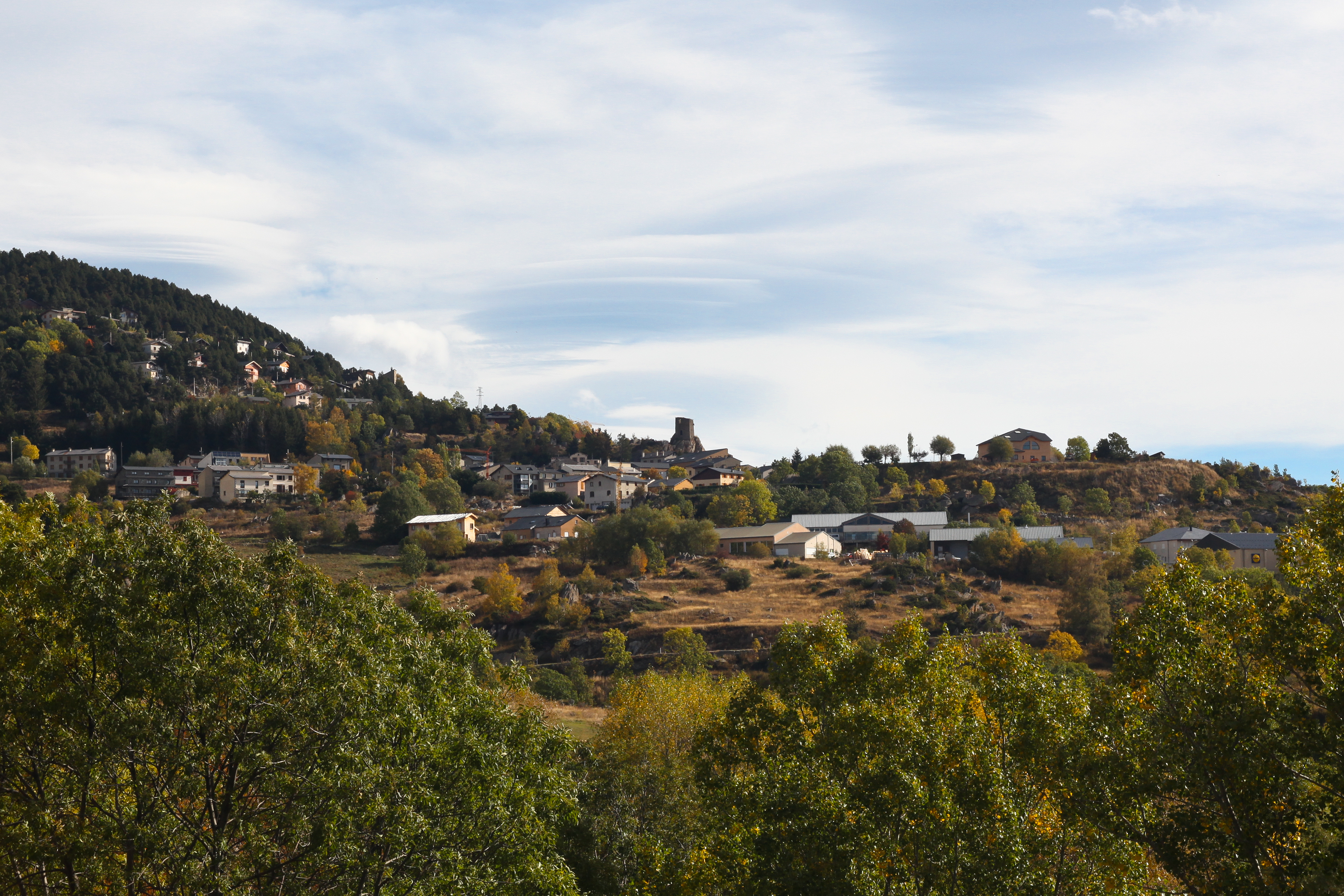 Village d'Égat, automne